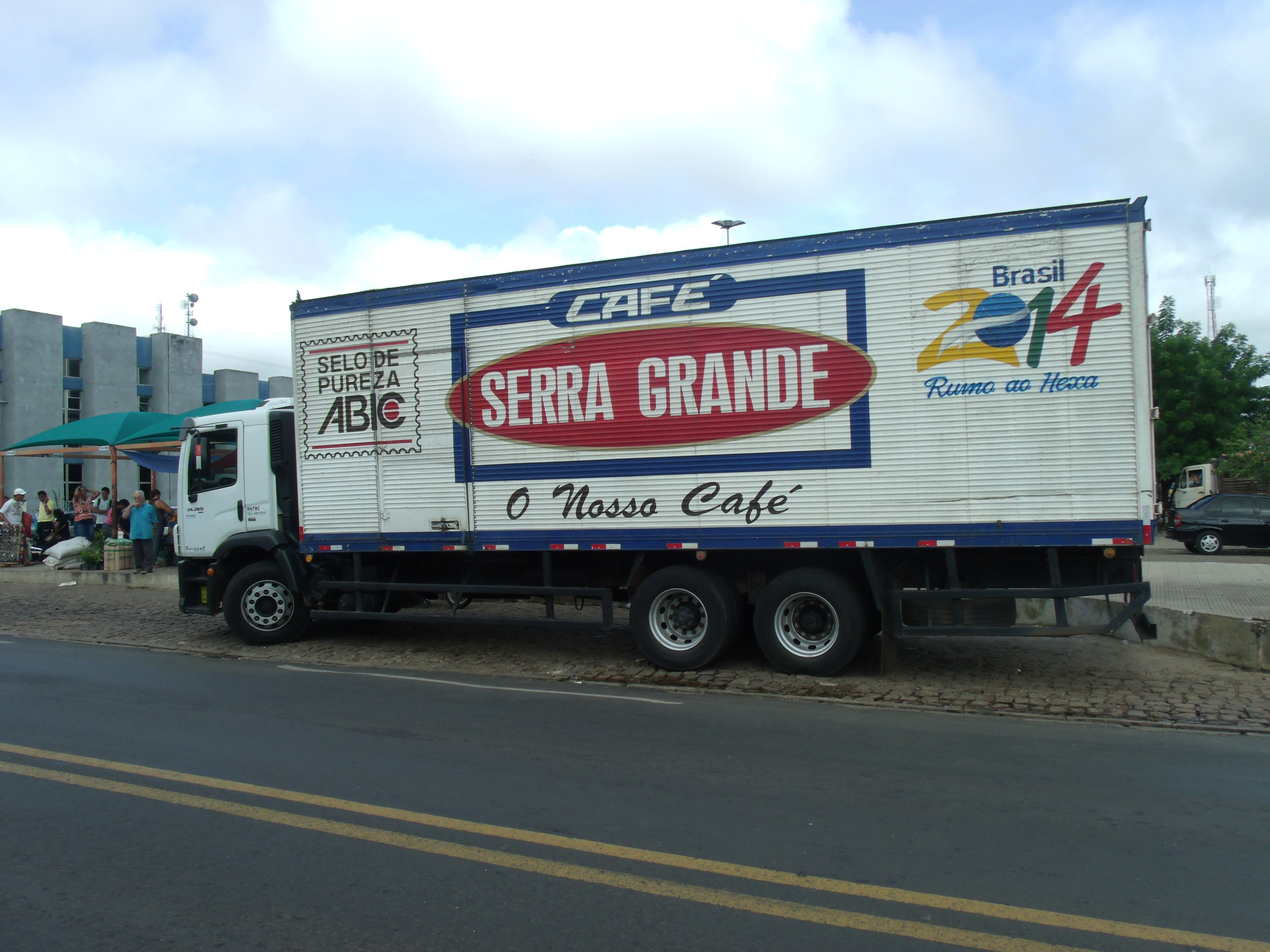 Caminhão do Café Serra Grande, uma industria de Sobral-Ceará.